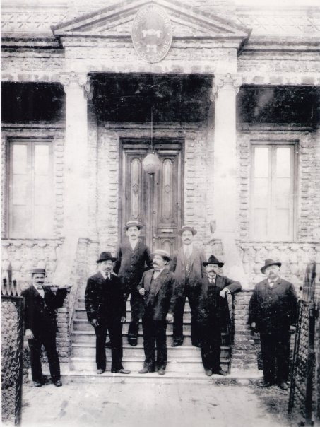 Sociedad Italiana 20 Settembre, Merlo, 1920.